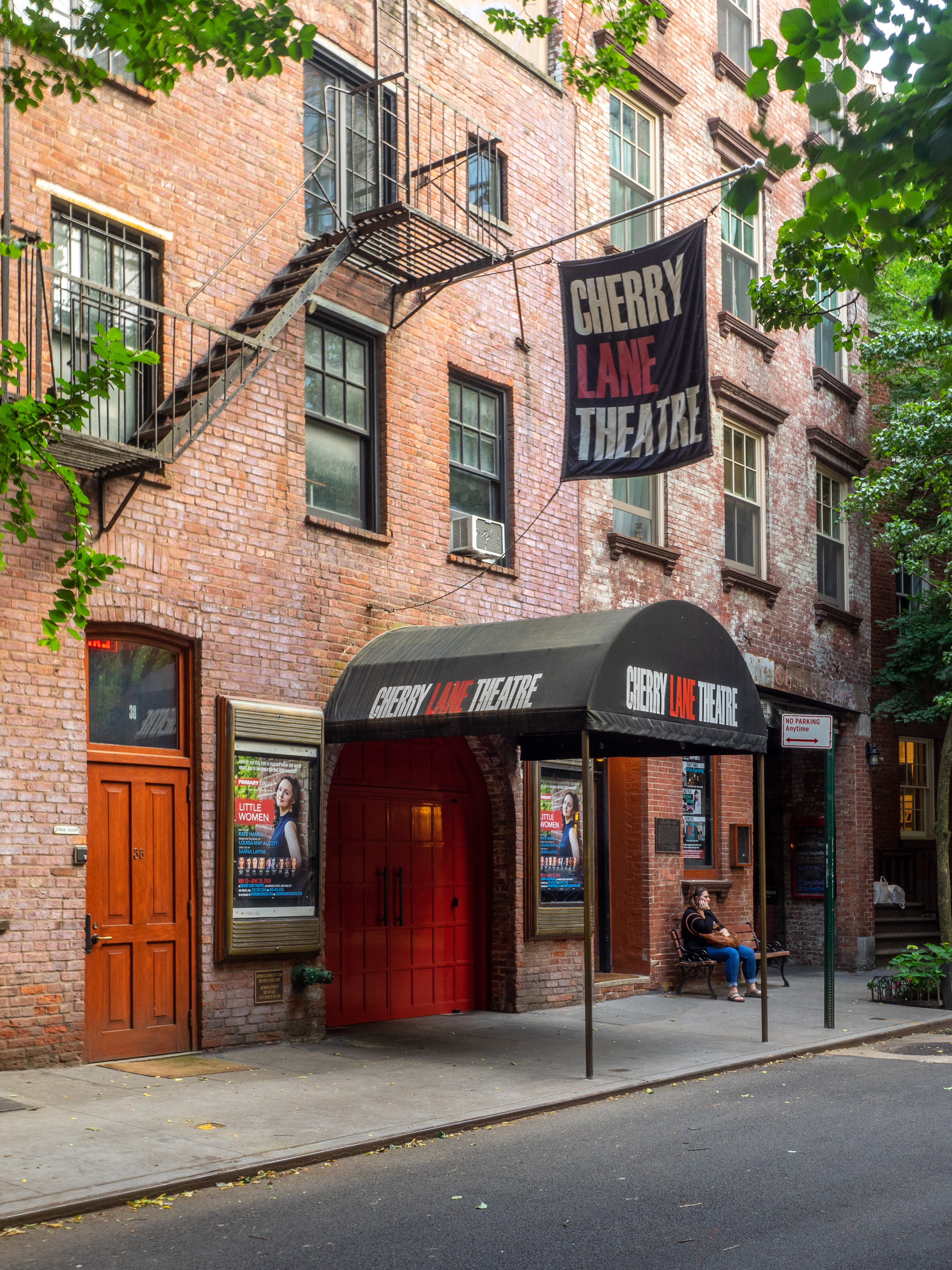 Greenwich Village, NYC